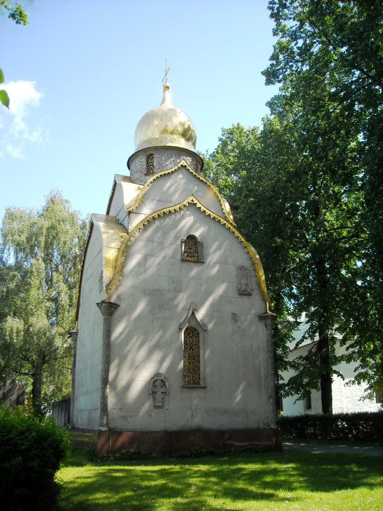 Монастырь Новодевичий (Москва и Московская область, Москва, Новодевичий пр., 1)